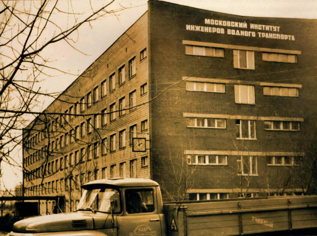 МИИВТ